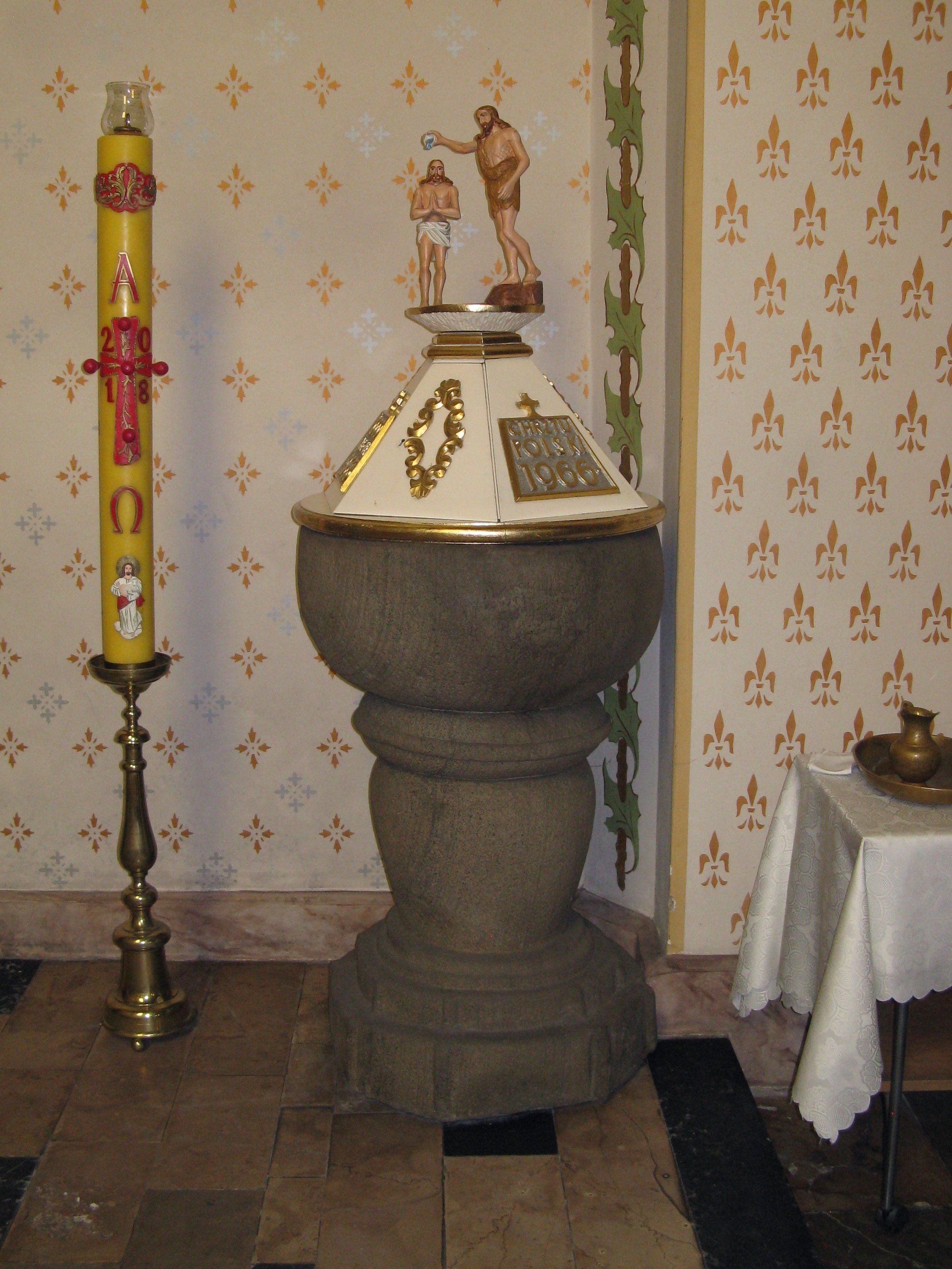 Rajcza, Kościół św. Wawrzyńca i św. Kazimierza Królewicza w Rajczy, barokowa kamienna chrzcielnica ze starego kościoła Wikidata has entry Q11747537 with data related to this item.